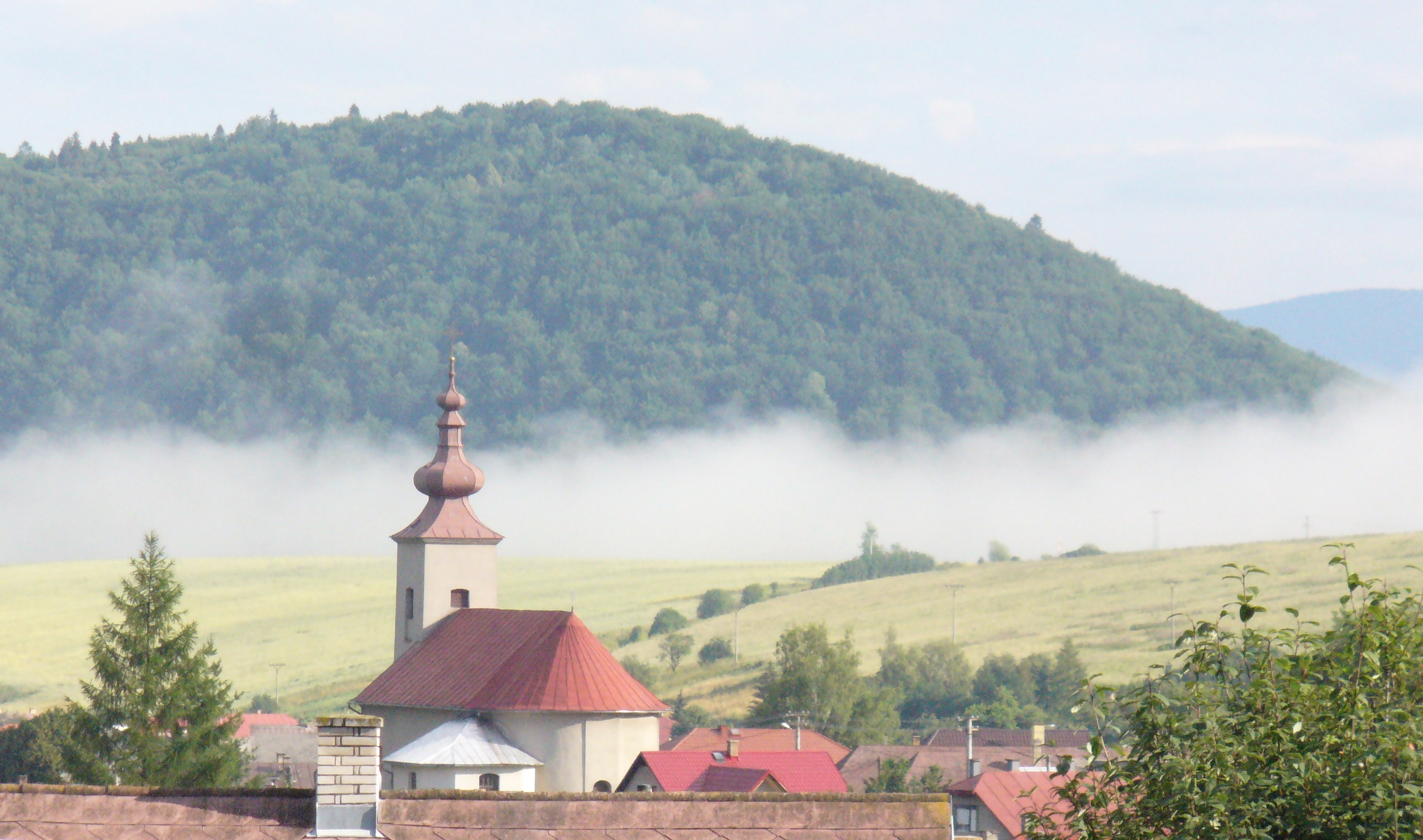 Taken from the village, near gypsy slam.